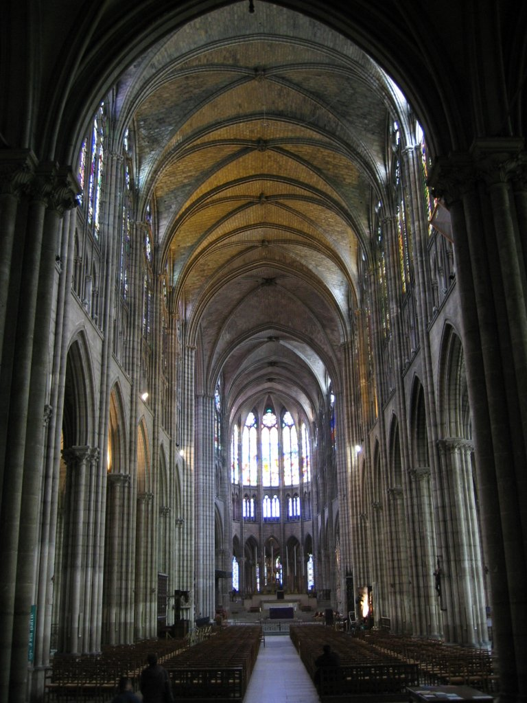 Basilique Saint-Denis de Saint-Denis au nord de Paris